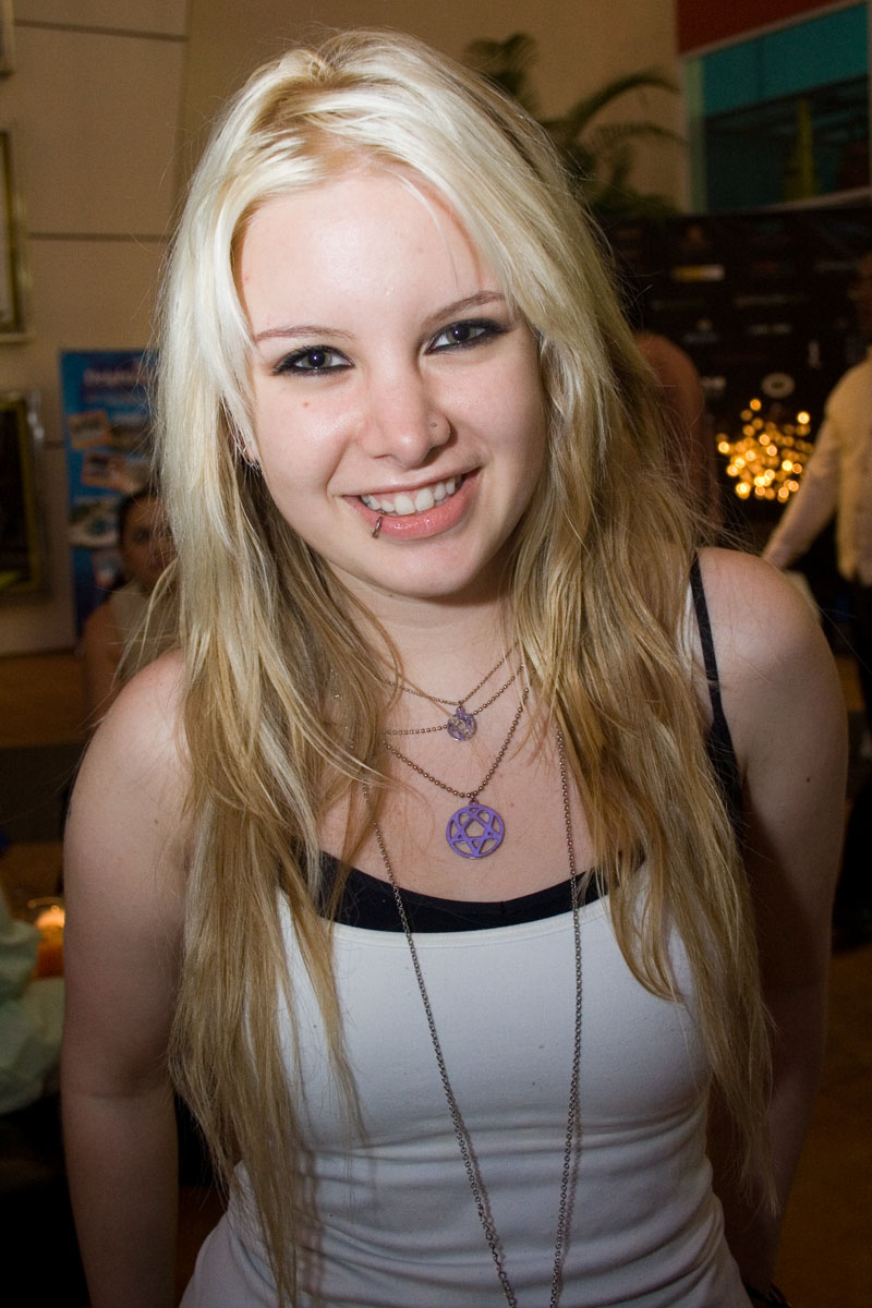 Maria Fernanda Malo "Fuzz" en la apertura del Cancún Film Festival 2007